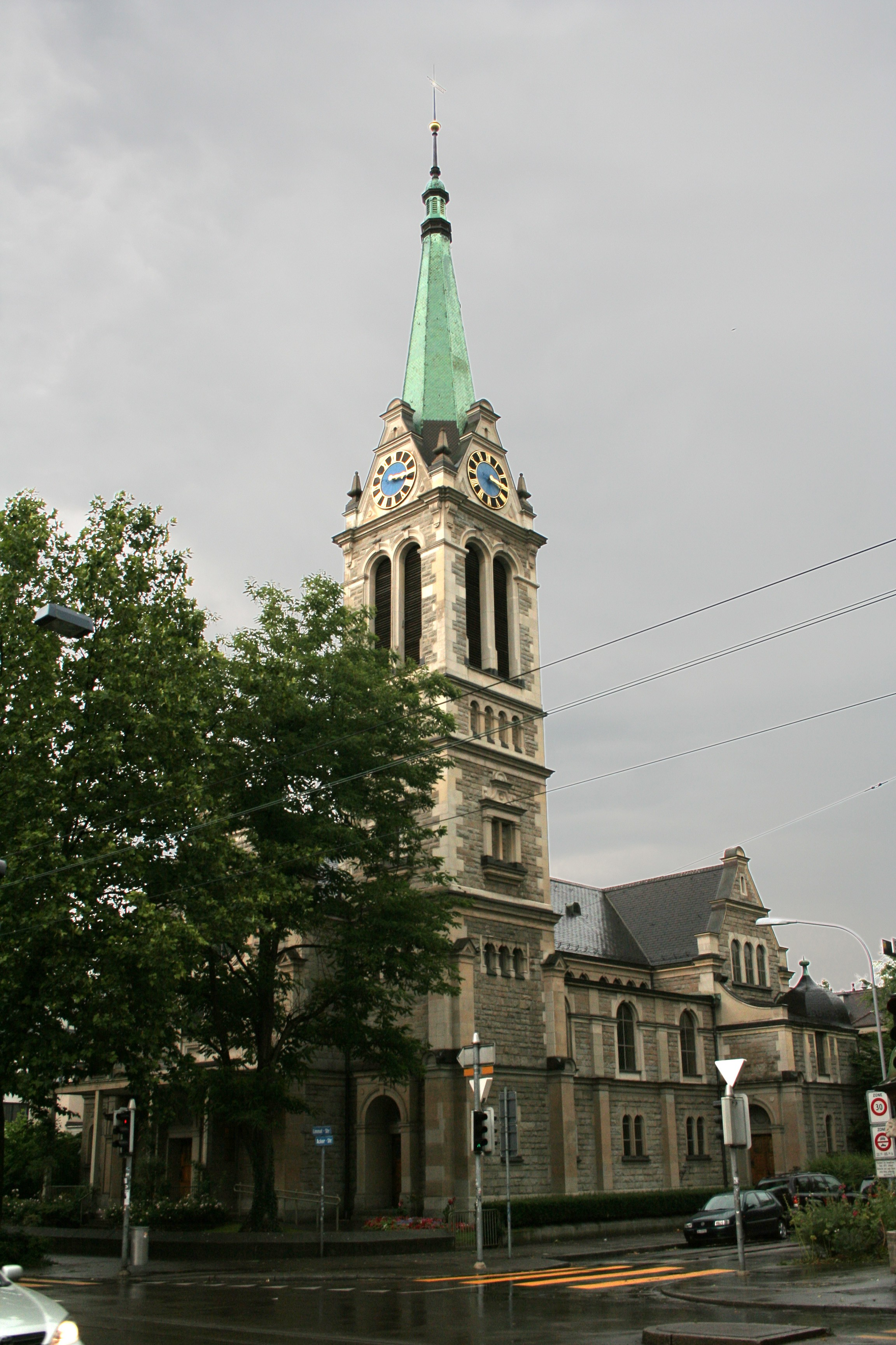 Johanneskirche an der Limmatstrasse in Zürich, Schweiz Erbaut nach Plänen Paul Reber 1898